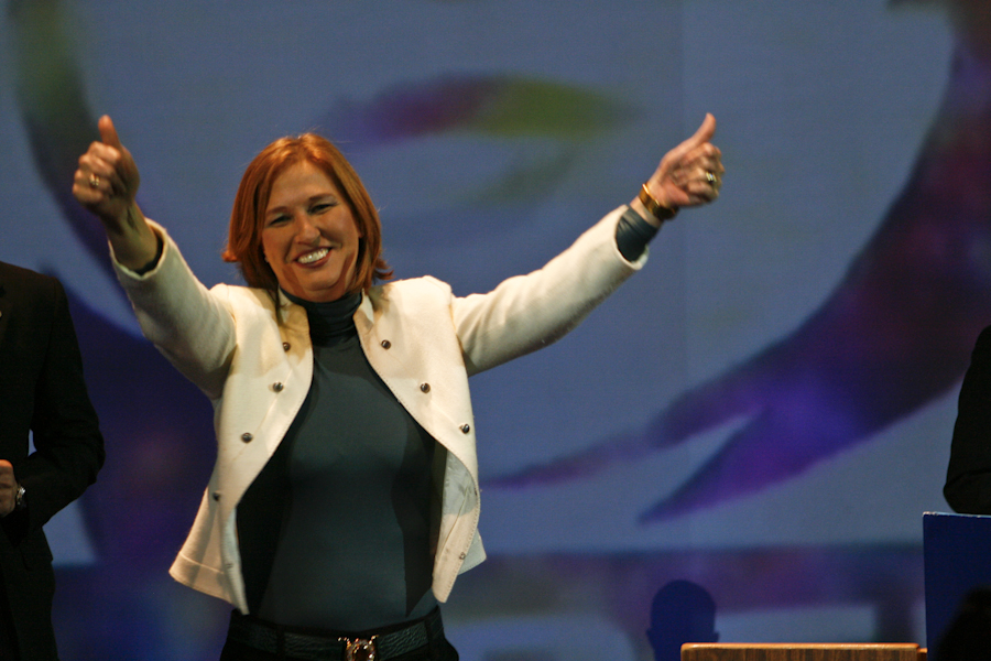 Tzipi Livni, Leader of Kadima Party -Israel. ציפי לבני, יו"ר מפלגת קדימה, ישראל צילום: סנדי טפרסון, צעירים למען ציפי לבני